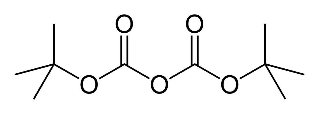 Structural formula of the di-tert-butyl dicarbonate molecule